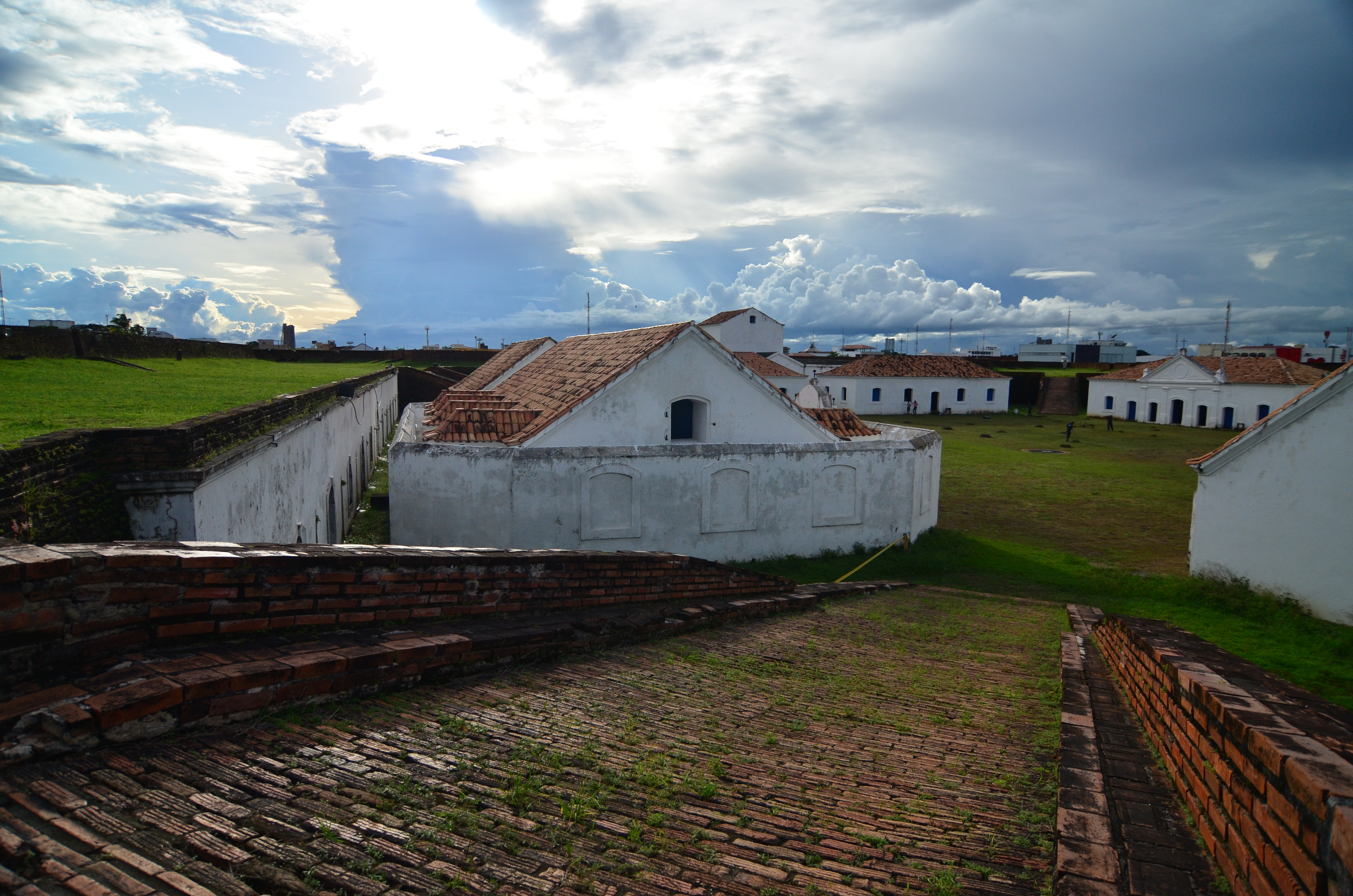 Fortaleza de São José de Macapá